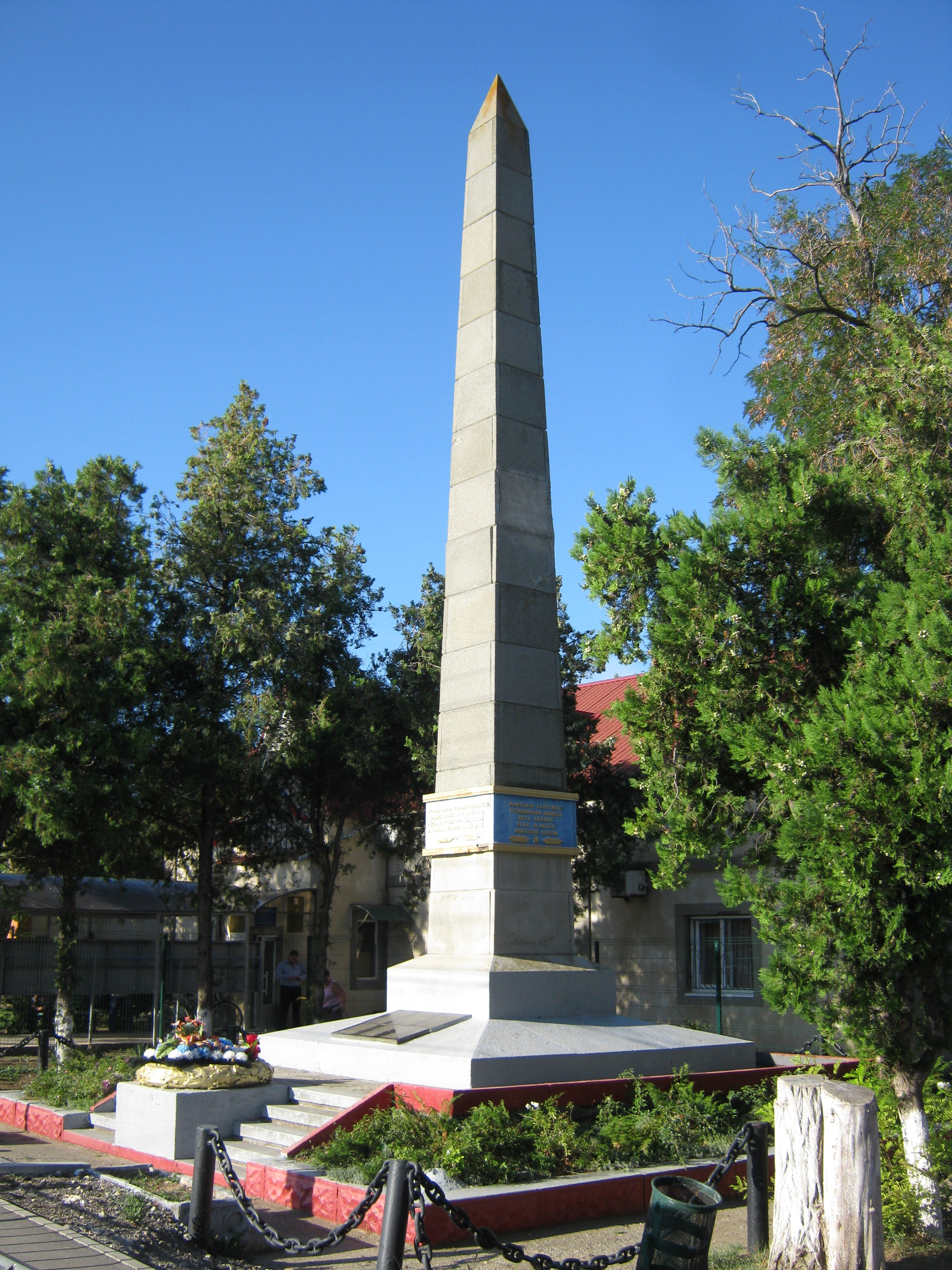 Обелиск землякам павшим в боях за советскую Родину (Николаевка, Крым) 3